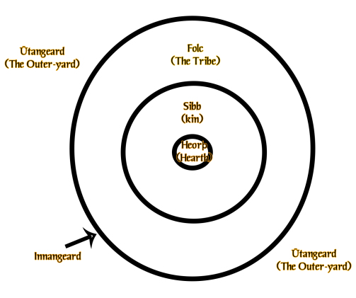 Círculo de intragrupo e extragrupo